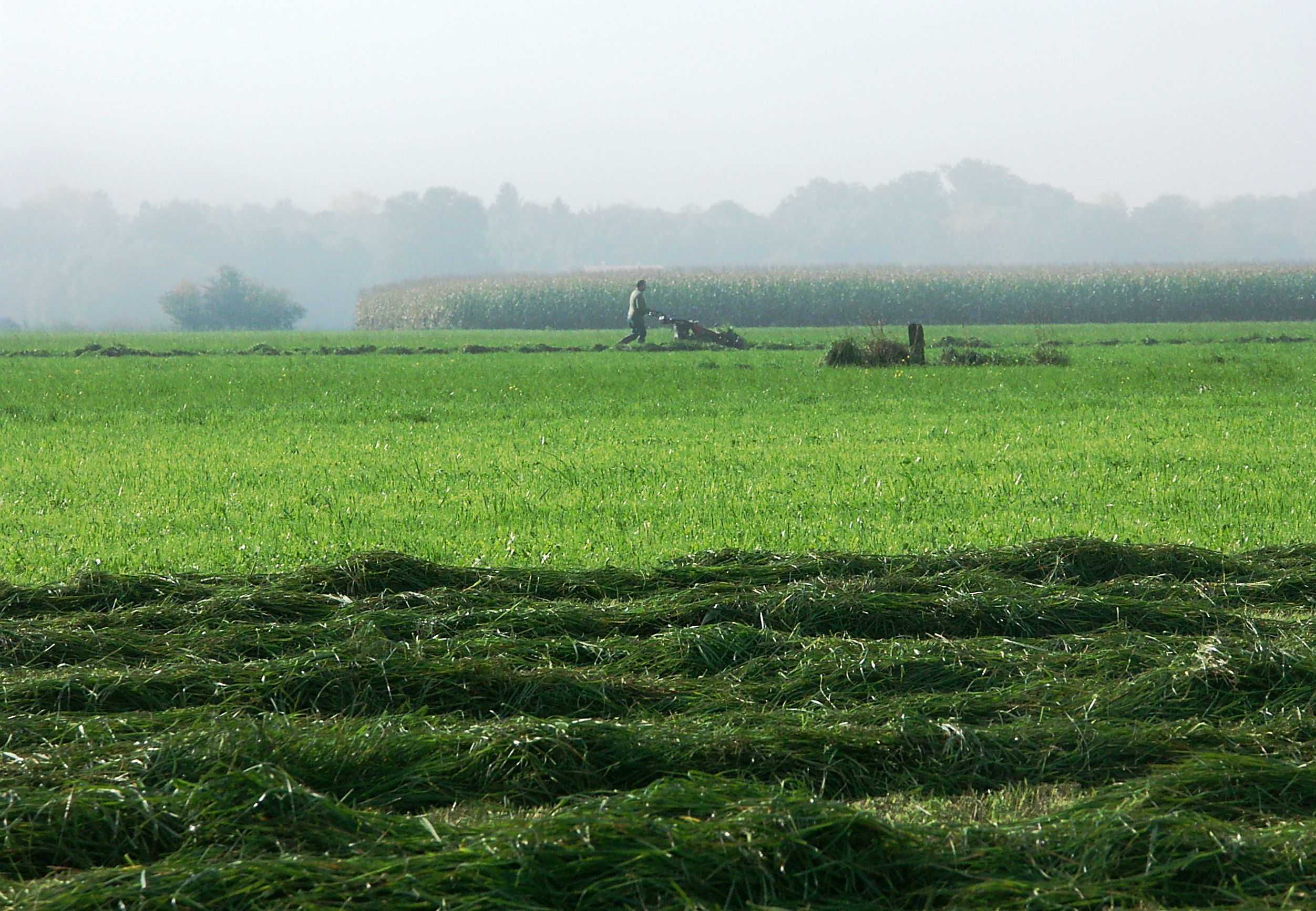 Rohrspitz; Bauer beim Mähen + Bodensee-Rundwanderweg